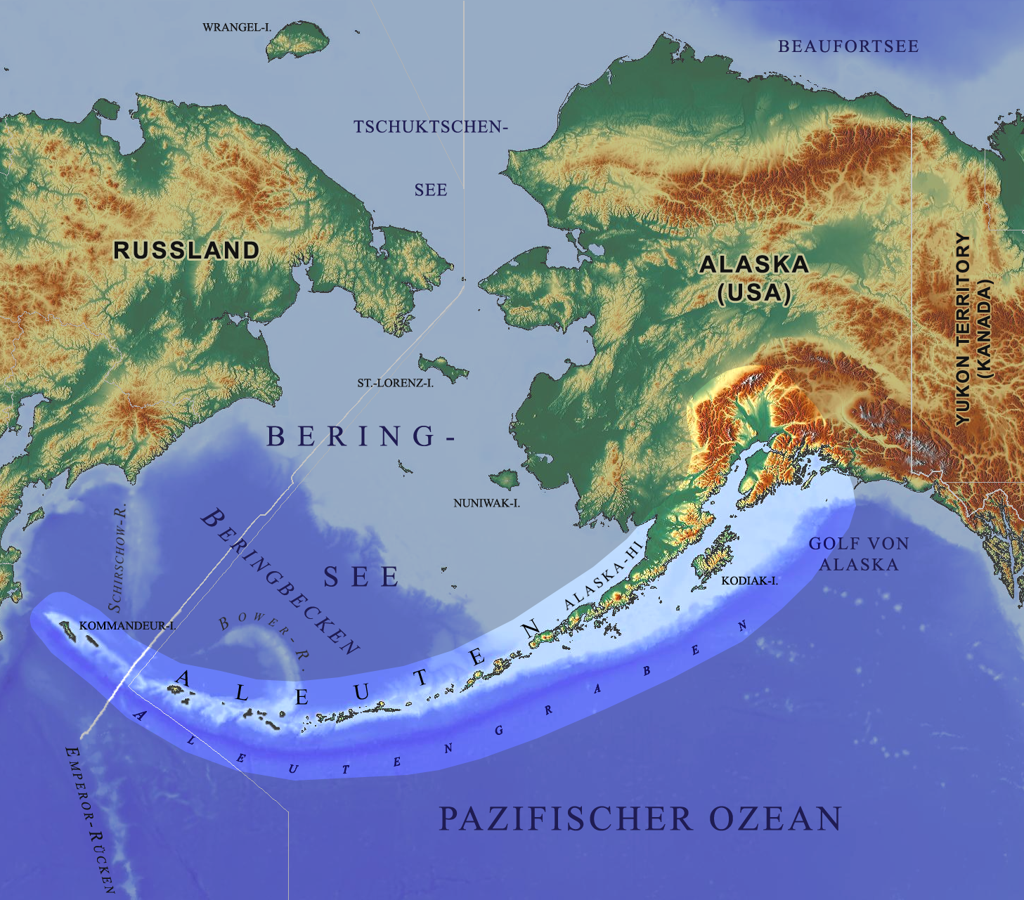 Geograpische Lage und Erstreckung des Aleuten Vulkanbogens